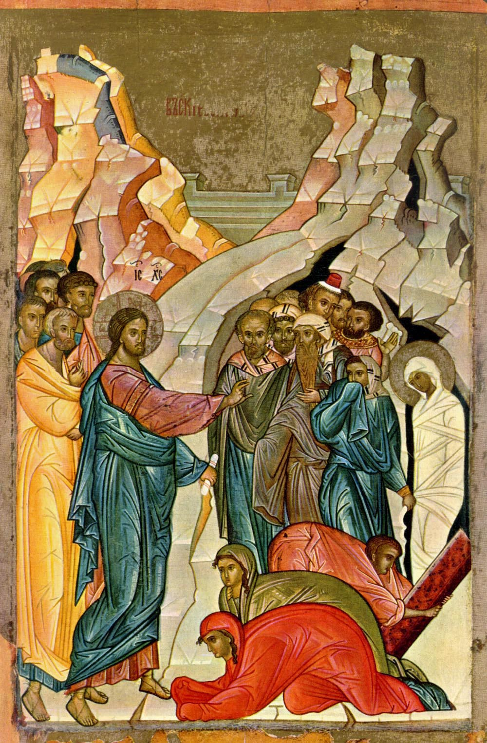 икона 15 века, новгородская школа, Новгород, Музей истории и искусства